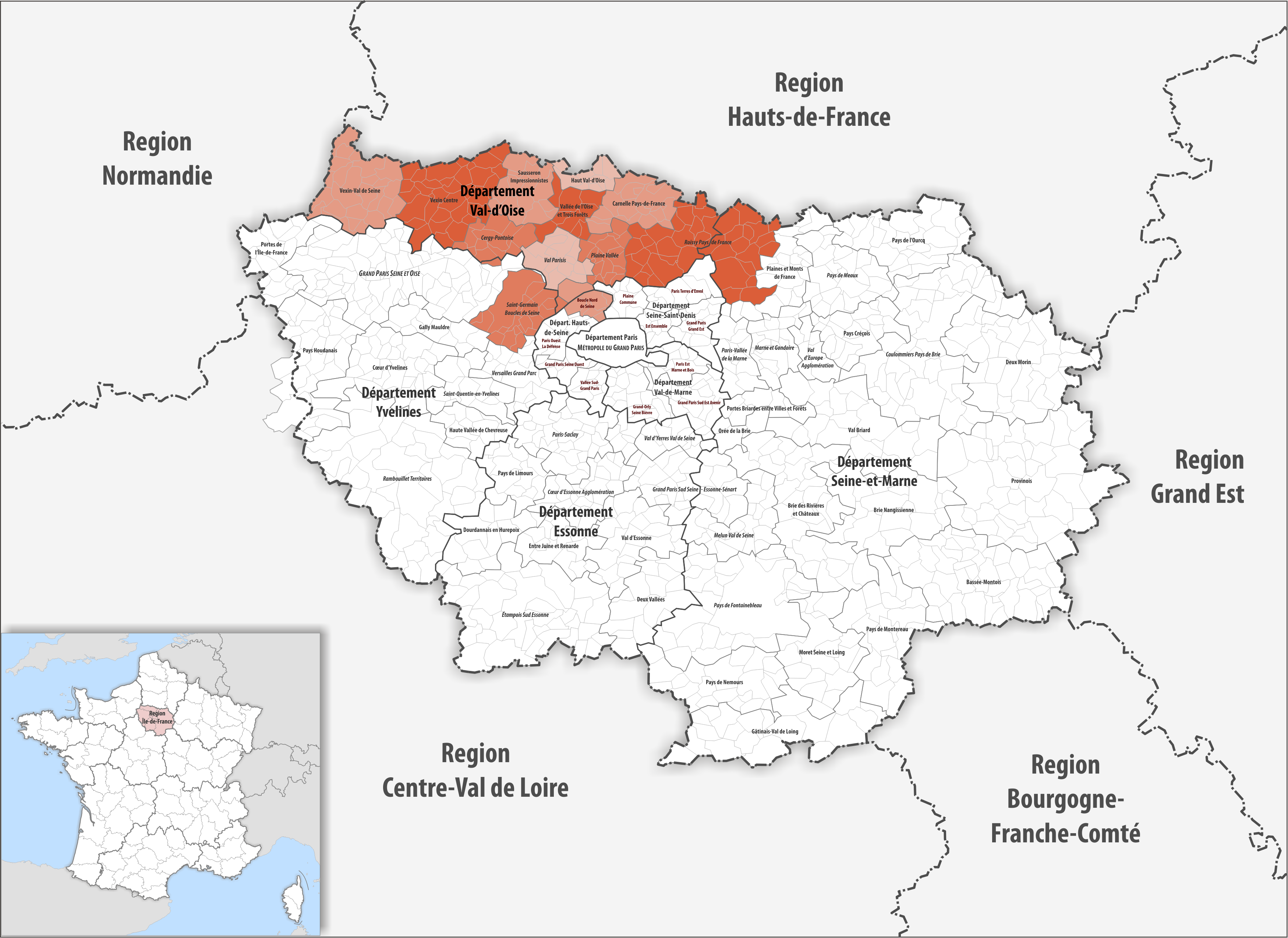 Gemeindeverbände im Département Val-d’Oise